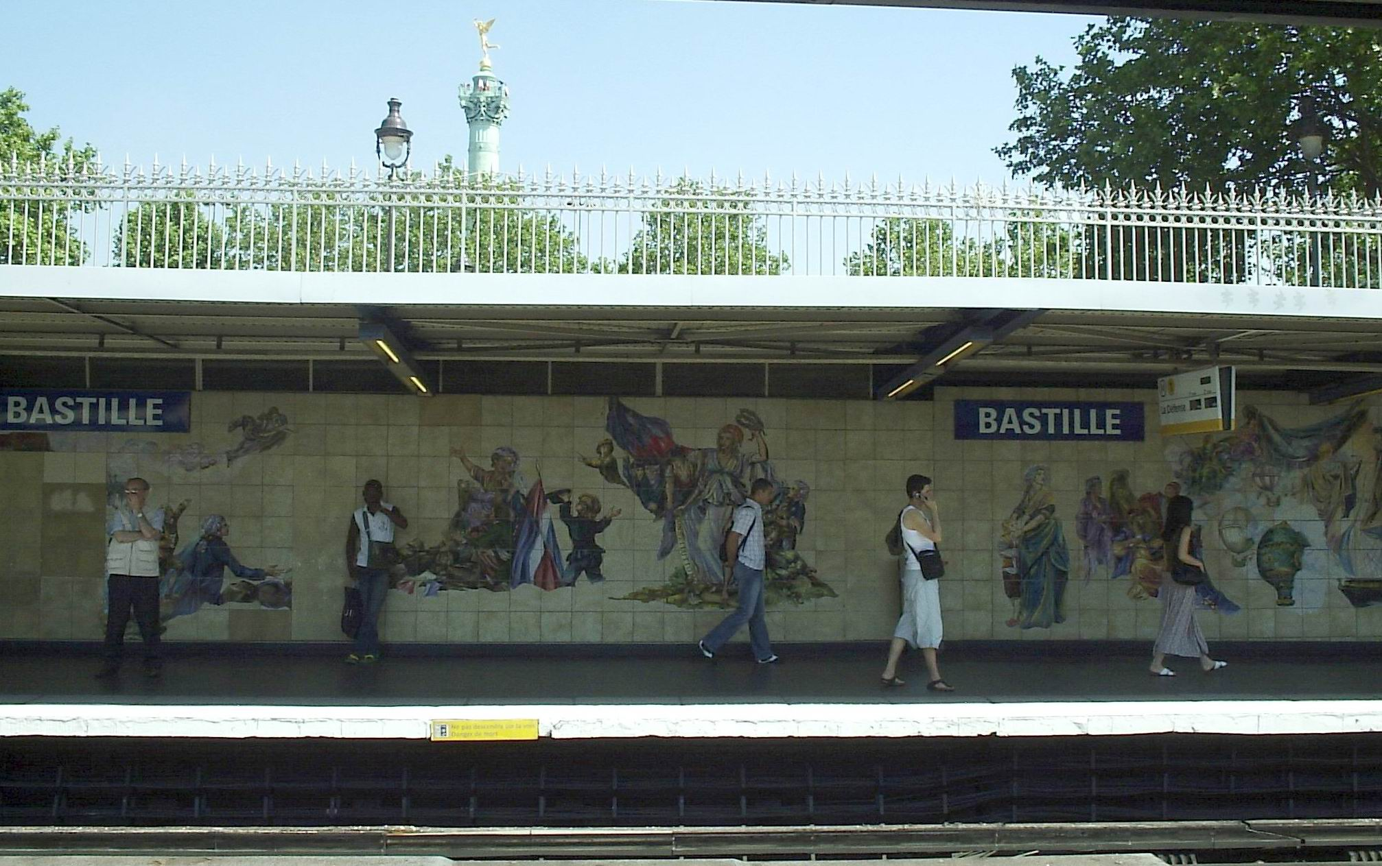 Description : Station Bastille sur la ligne 1 - fresque Date : 07/2006 Author : Sebb